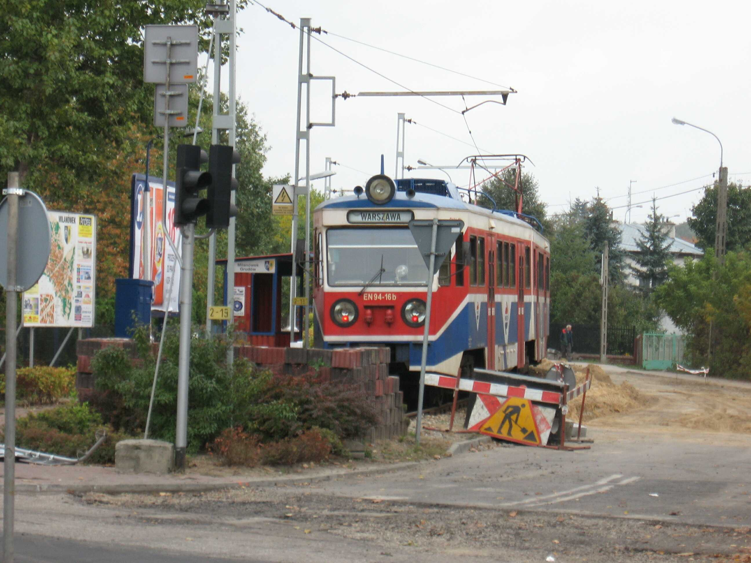 EN94 electric multiple unit at Milanówek